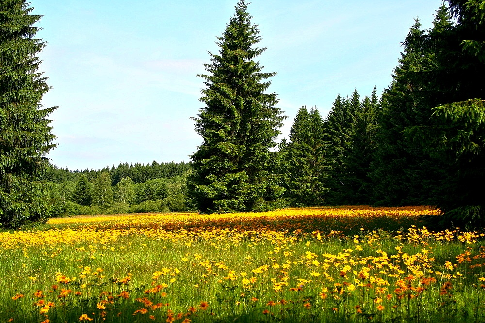 Blühender Arnika (Bergwohlverleih) in einem Naturschutzgebiet im Erzgebirge im Jahre 2013. So üppig wie in diesem Jahr, war die Blüte noch nicht wieder.